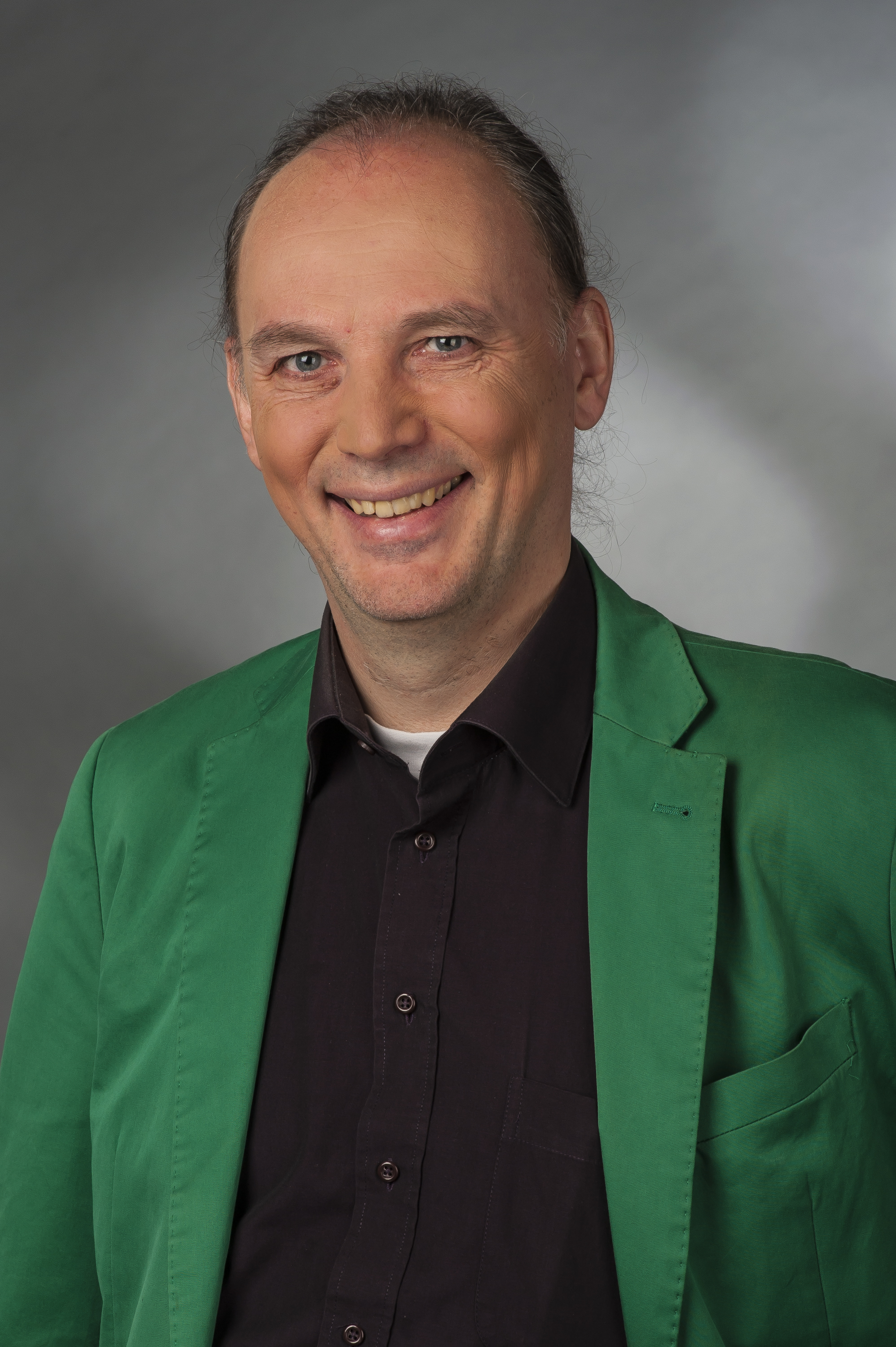 Wolfgang Strengmann-Kuhn (* 20. Mai 1964 in Dinslaken) ist ein deutscher Politiker (Bündnis 90/Die Grünen). Er ist Wirtschaftswissenschaftler und Mitglied des Deutschen Bundestages.